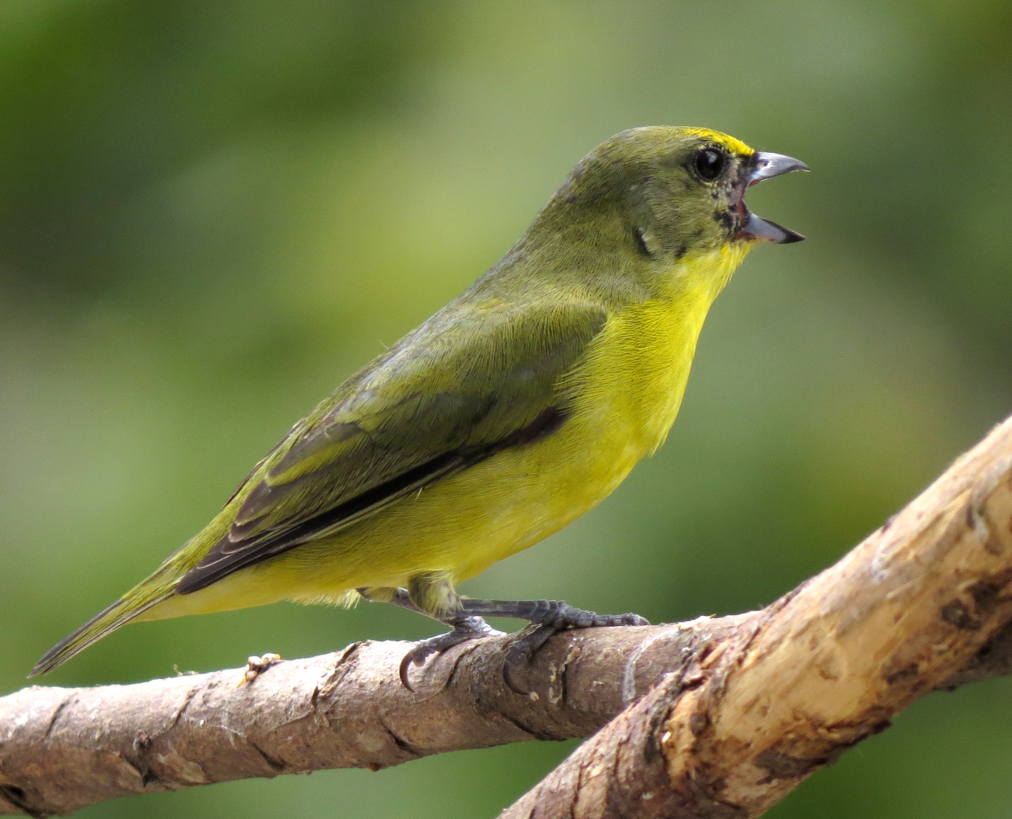 Euphonia laniirostris (Eufonia gorgiamarilla) - Hembra